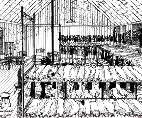 Zeichnung Baracken Lager Ladelund